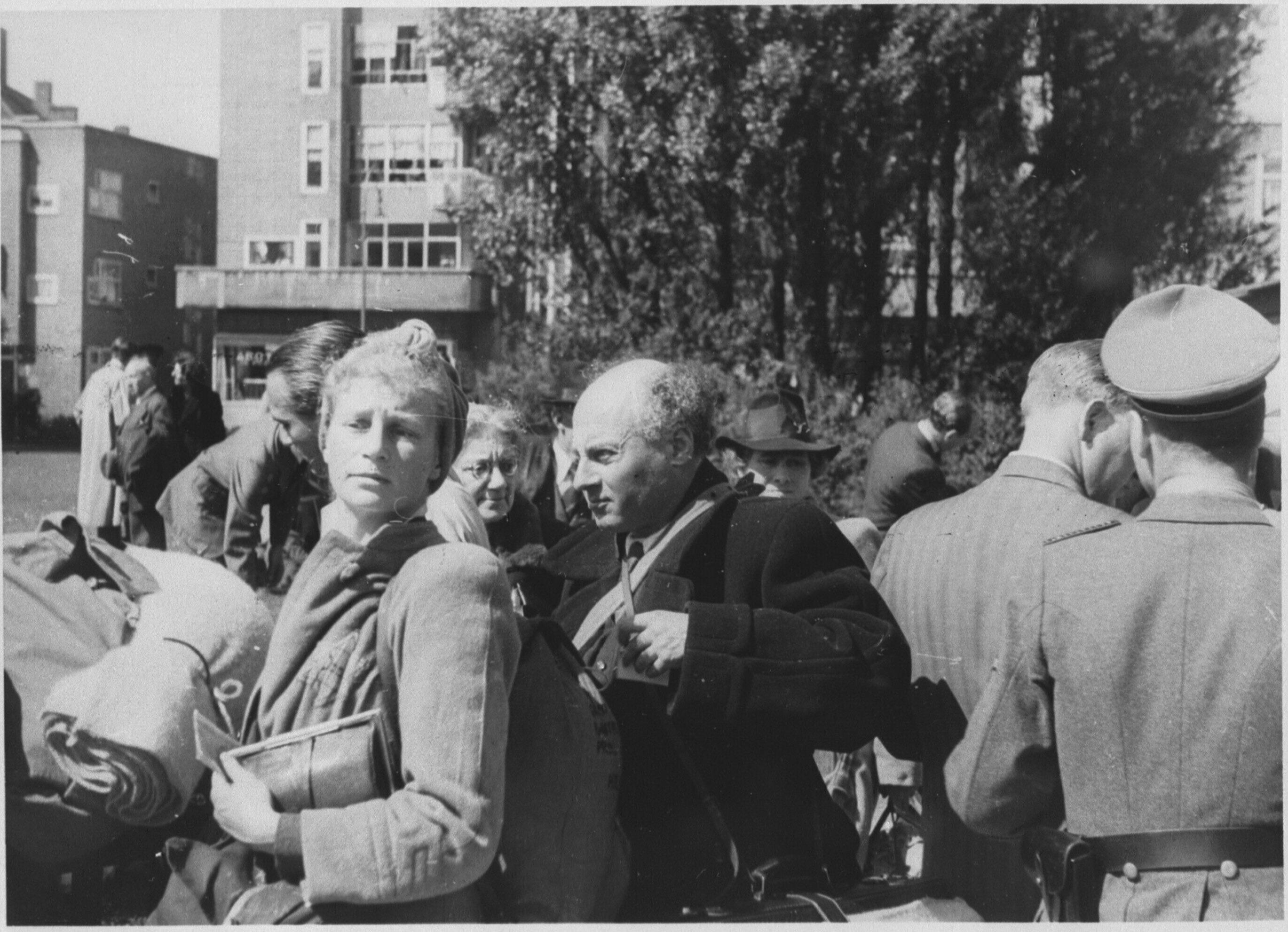 Amsterdamse joden op het Daniël Willinkplein (het latere Victorieplein) in afwachting van deportatie naar kamp Westerbork, 20 juni 1943. Rechts op de rug is een lid van de Duitse Sicherheitspolizei (SiPo) te zien. Type